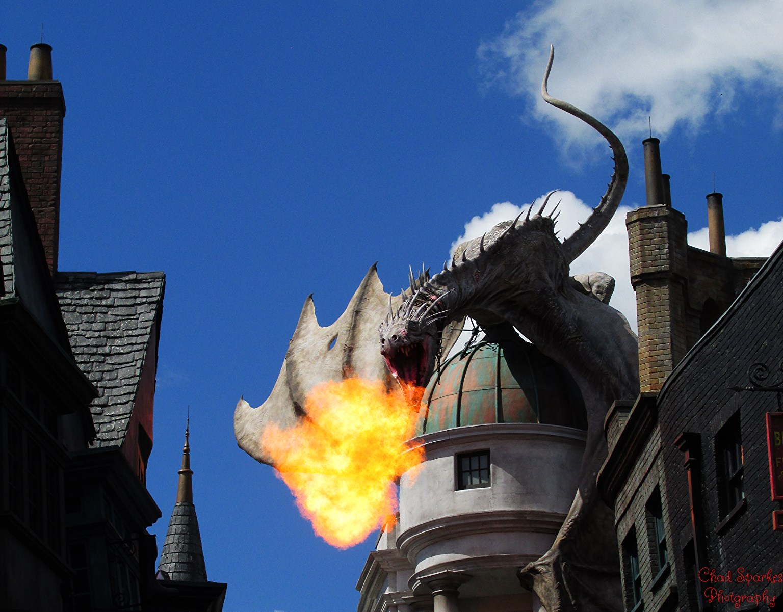 Diagon Dragon